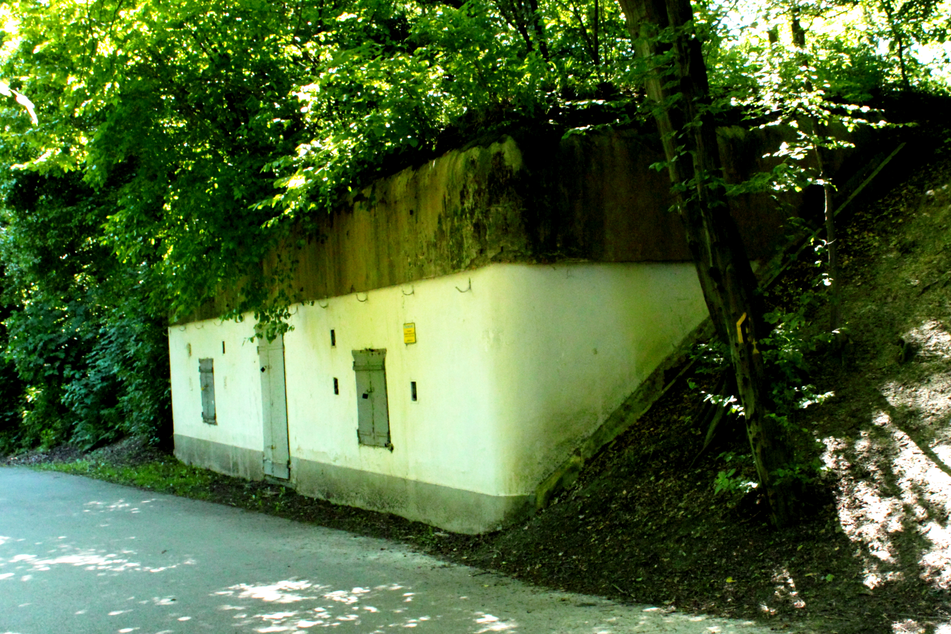 Kazamata Fortu FB-36, Twierdza Kraków